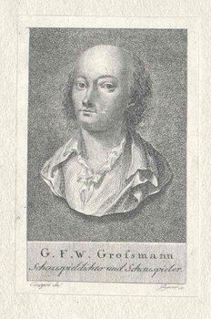 Gustav Friedrich Wilhelm Grossmann, Schauspieler, Schriftsteller und Theater-Regisseur in der Zeit der Aufklärung